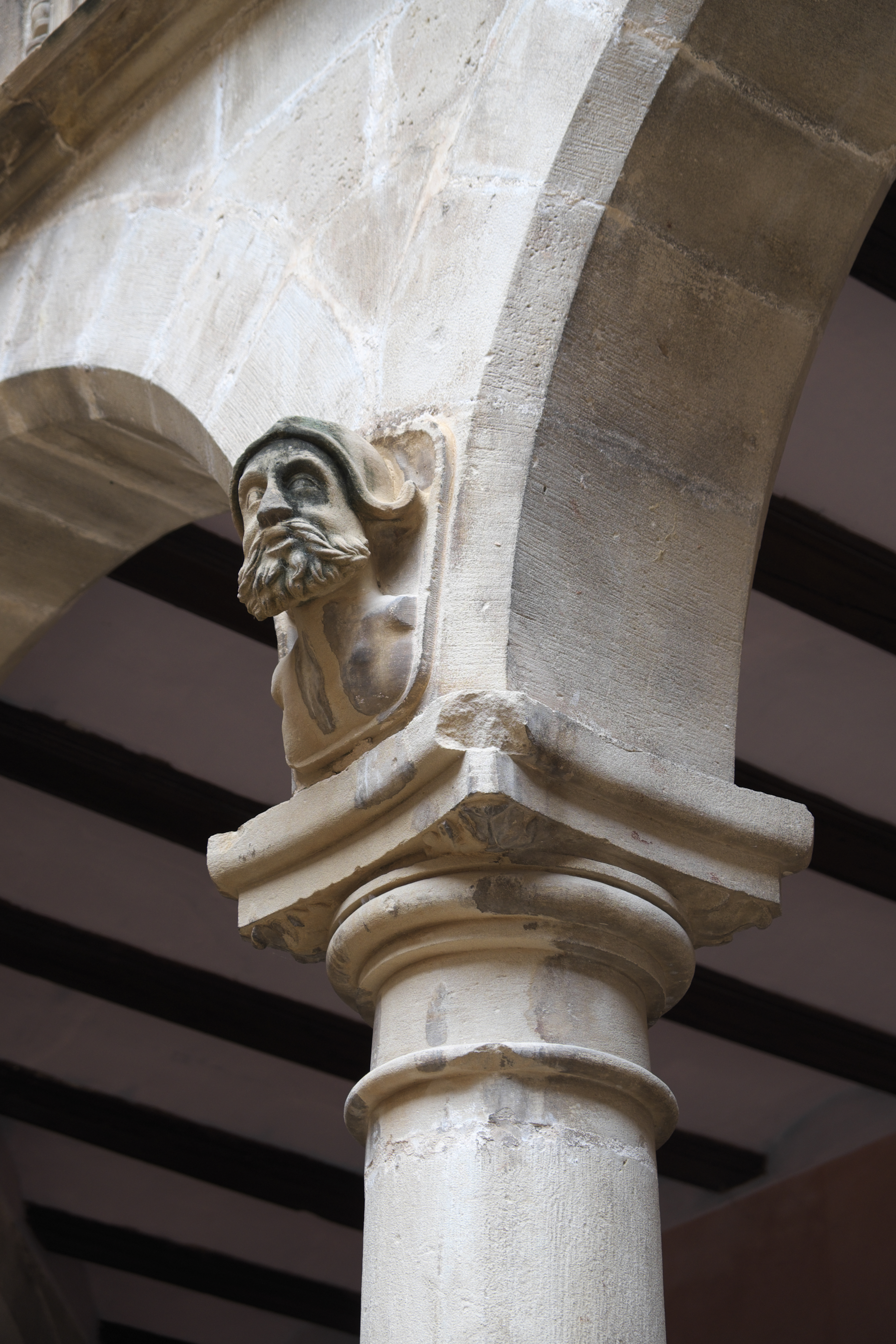 Colegio de San Jaime y San Matías in Tortosa in der Provinz Tarragona (Katalonien/Spanien), Kopf im Zwickel einer Säule des Innenhofes